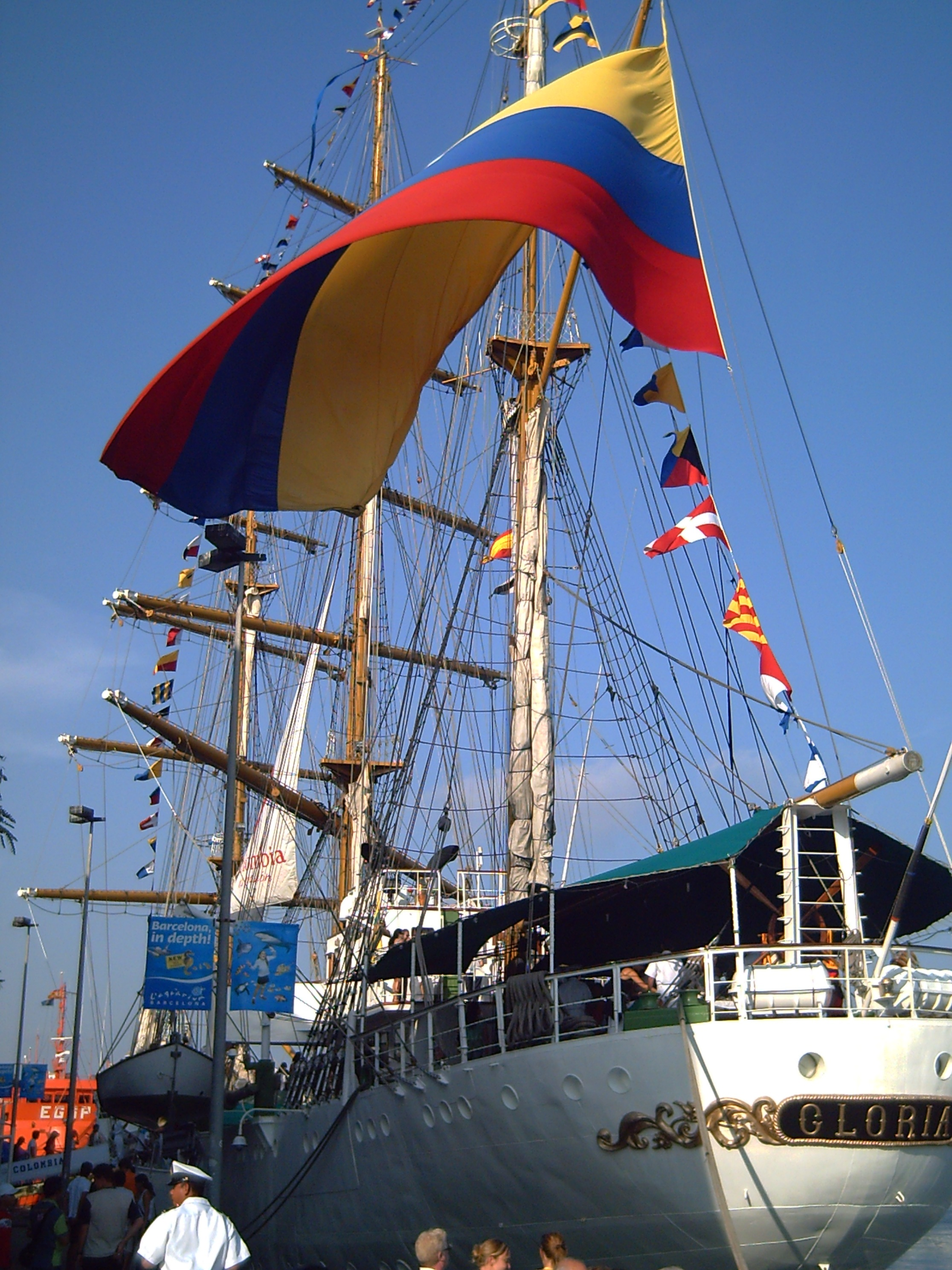 Buque escuela Gloria (Colombia) en el puerto de Barcelona